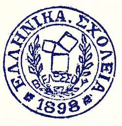 Печат на гръцкото училище във Велес